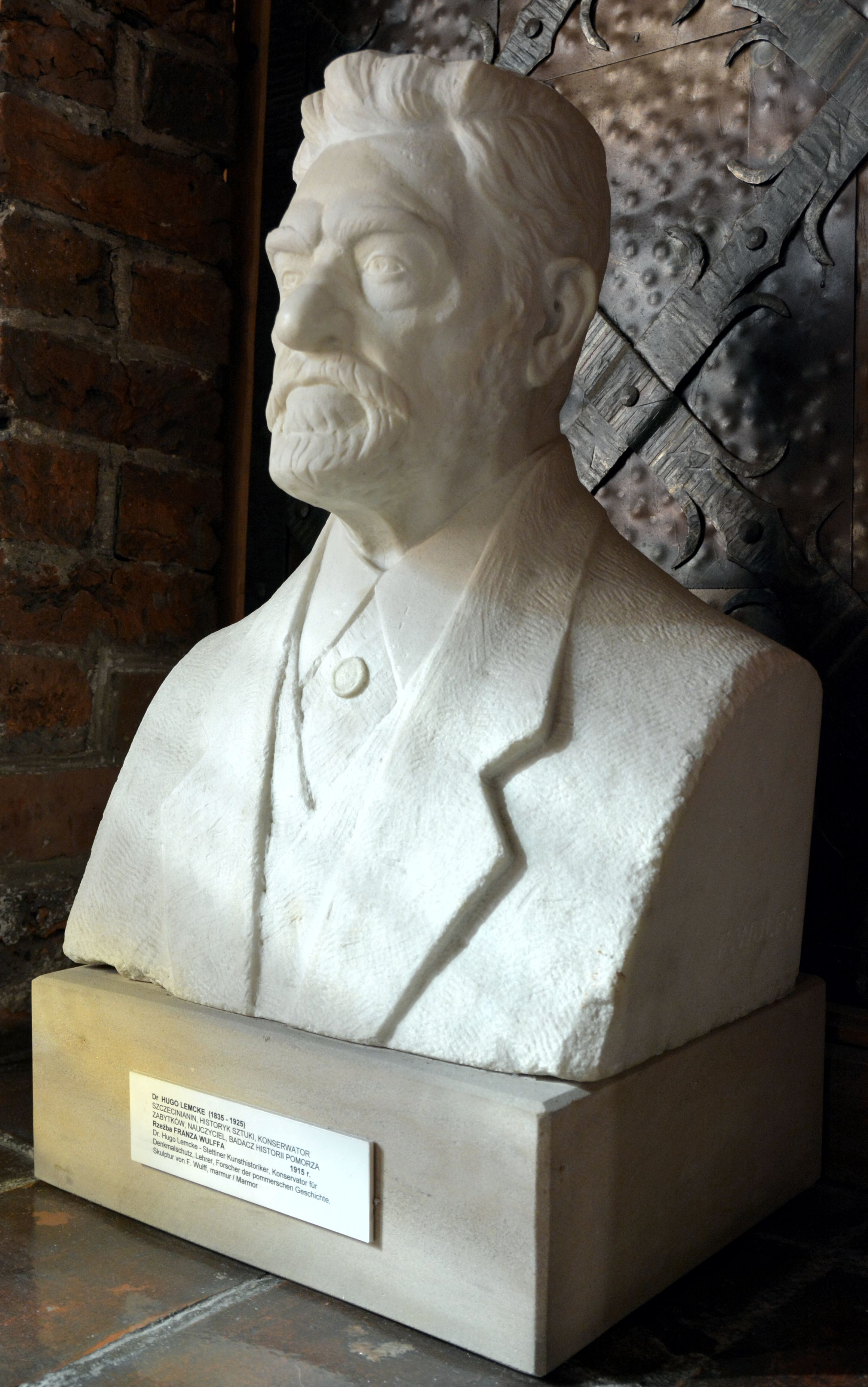 Hugo Lemcke (1835-1925) - popiersie wykonane przez Franza Wulffa w 1915 r. Eksponat Muzeum Narodowego w Szczecinie